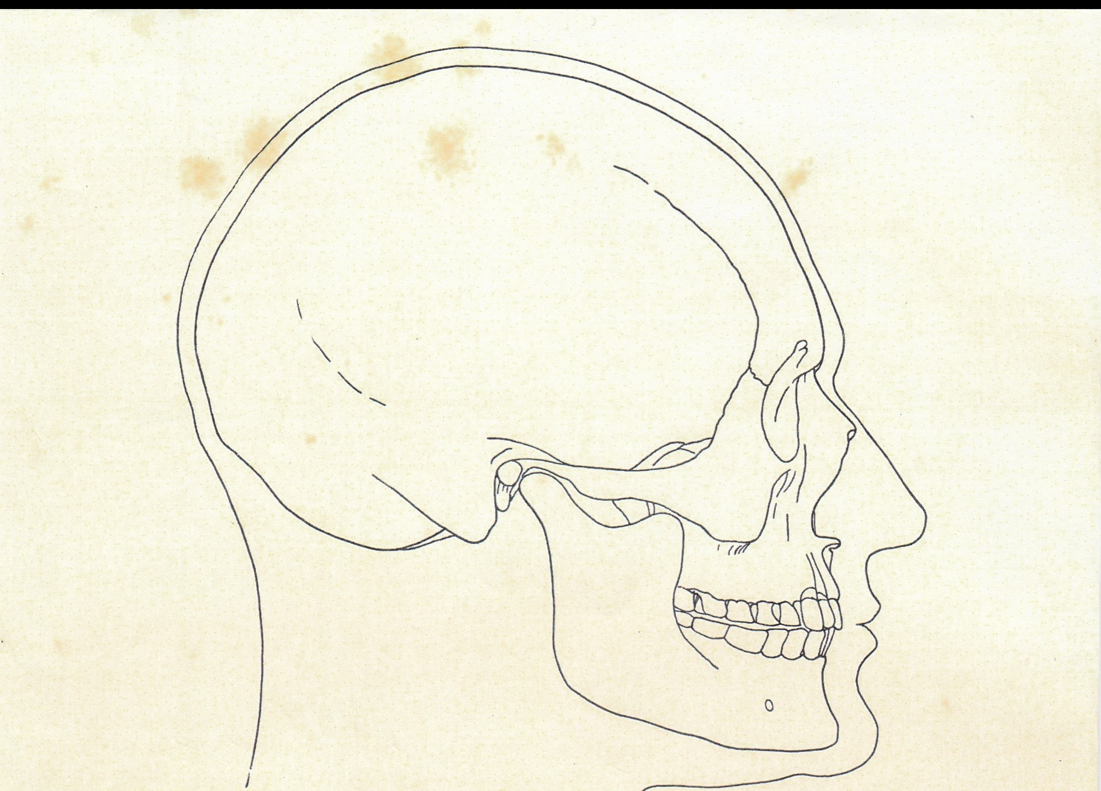 Dr. og professor i anatomi Fr. C. C. Hansen (1870-1934) gennemførte en række profilrekonstruktioner på baggrund af historiske personers kranier. Dronning Sophies profilrekonstruktion efter hendes kranium fra Ringsted Kirke blev udgivet i 1914.